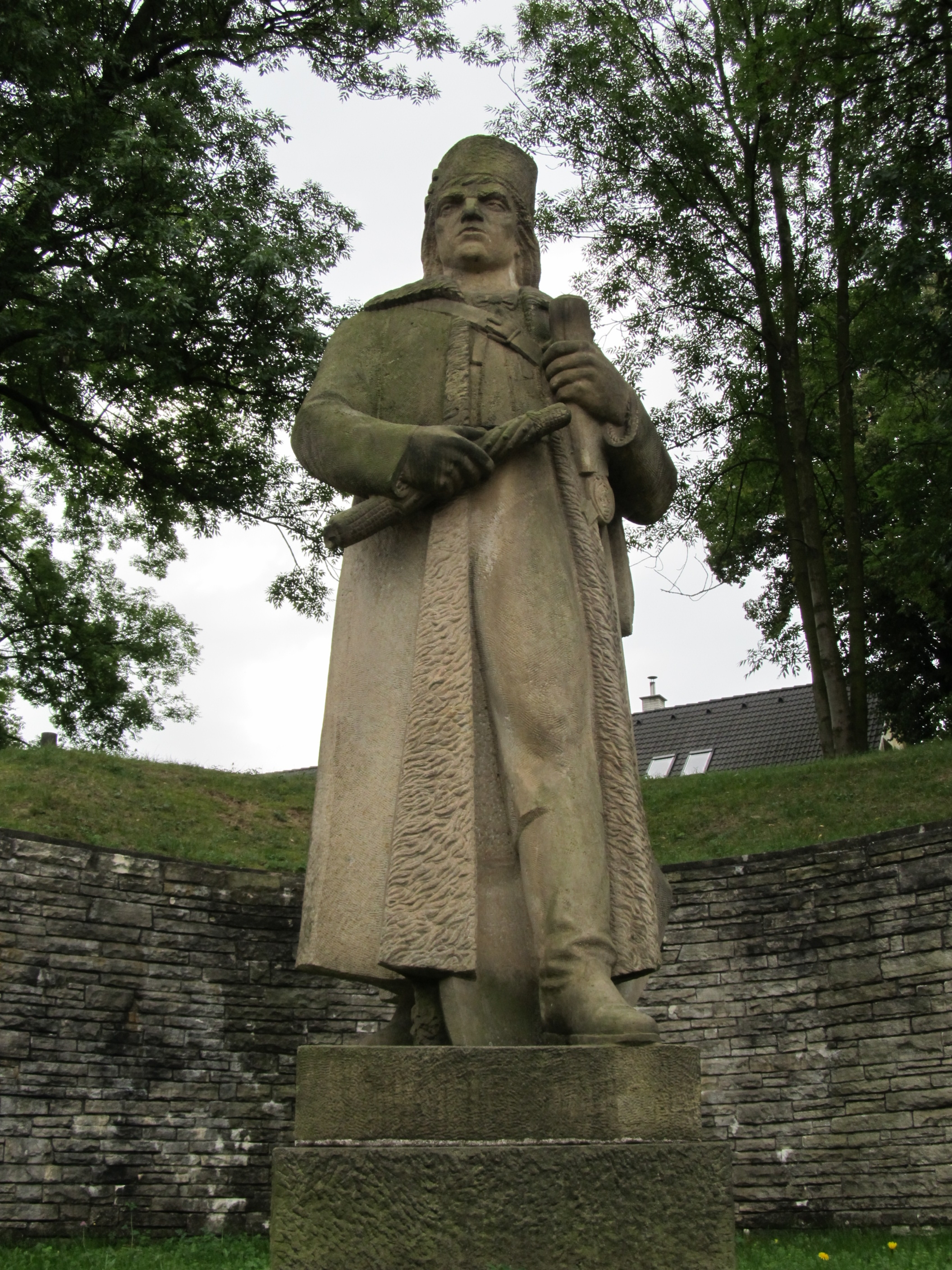 Socha rebela - rychtář Nývlt (Rtyně v Podkrkonoší), proti býv. rychtě, Rtyně v Podkrkonoší